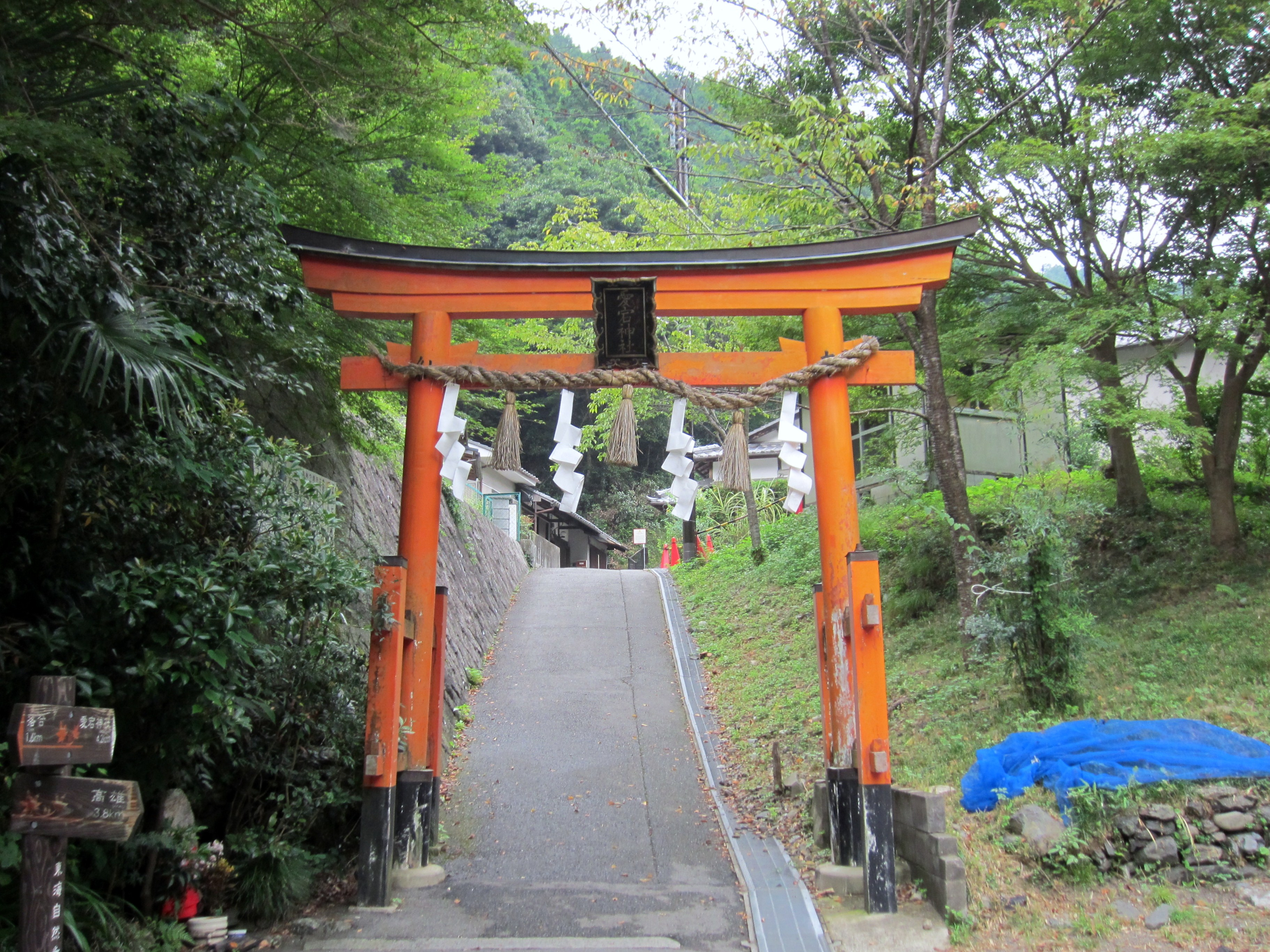 愛宕神社 (京都市) 清滝鳥居